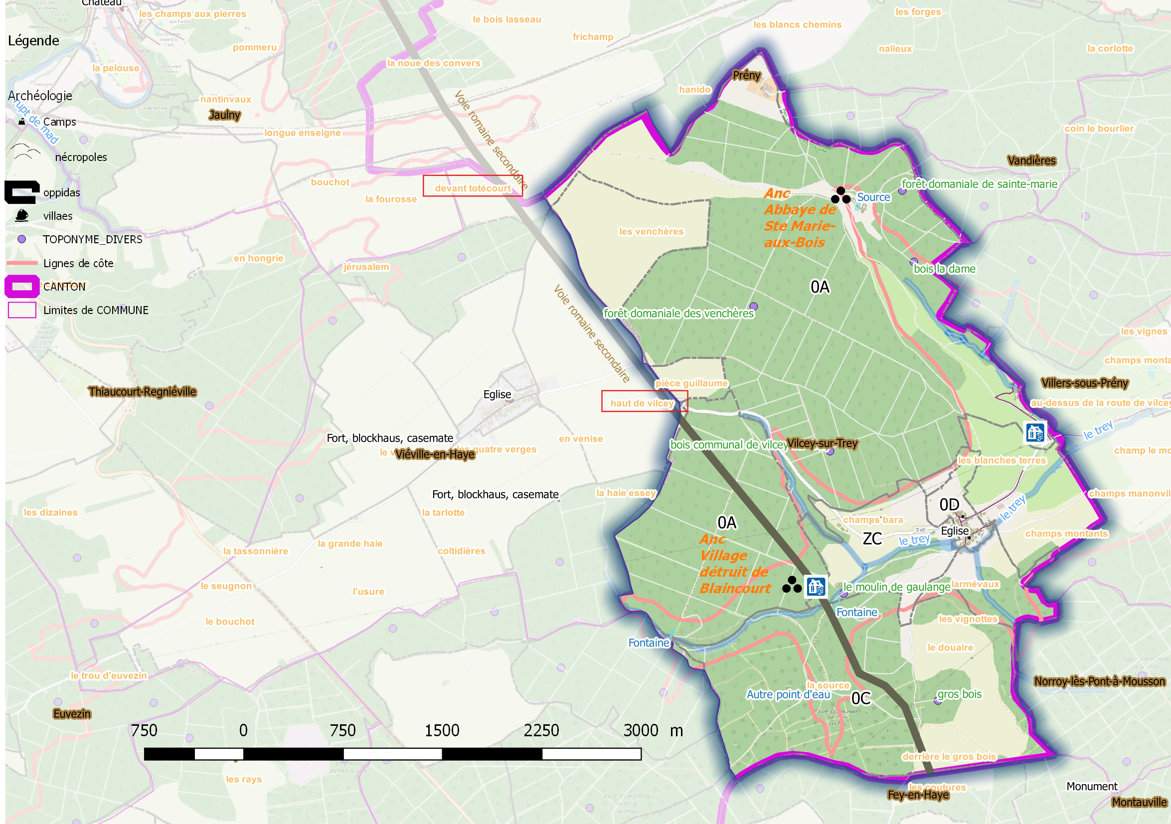 Vilcey (ban communal) OSM et Qgis, mentions additionnelles.